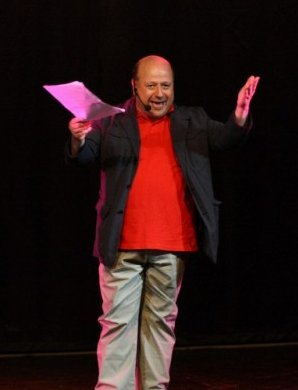 Roberto Mattioli conduce Rock in June 2011